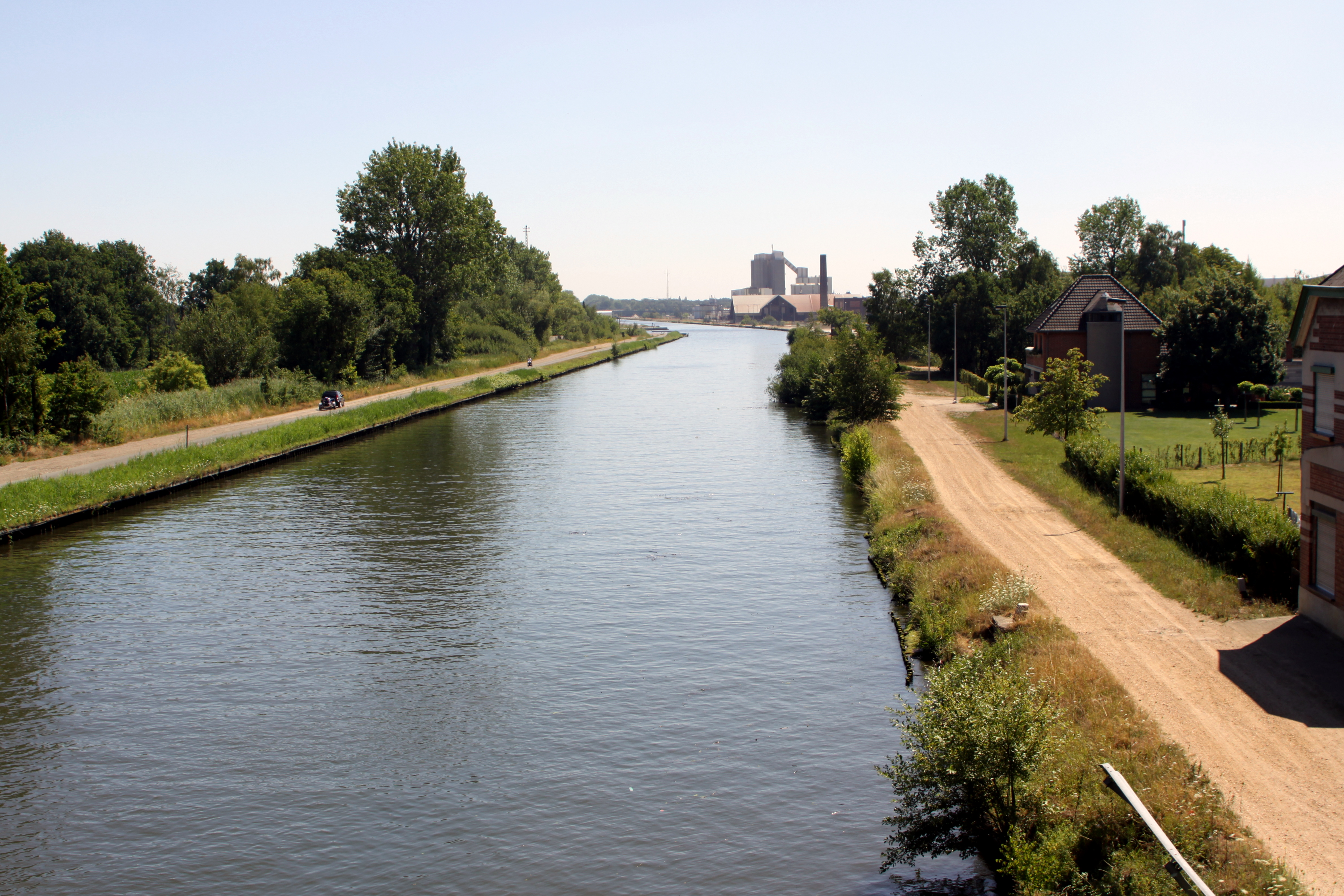 De Kanal Bocholt-Herentals vun der Joe's Bridge zu Lommel aus no Oste gekuckt.